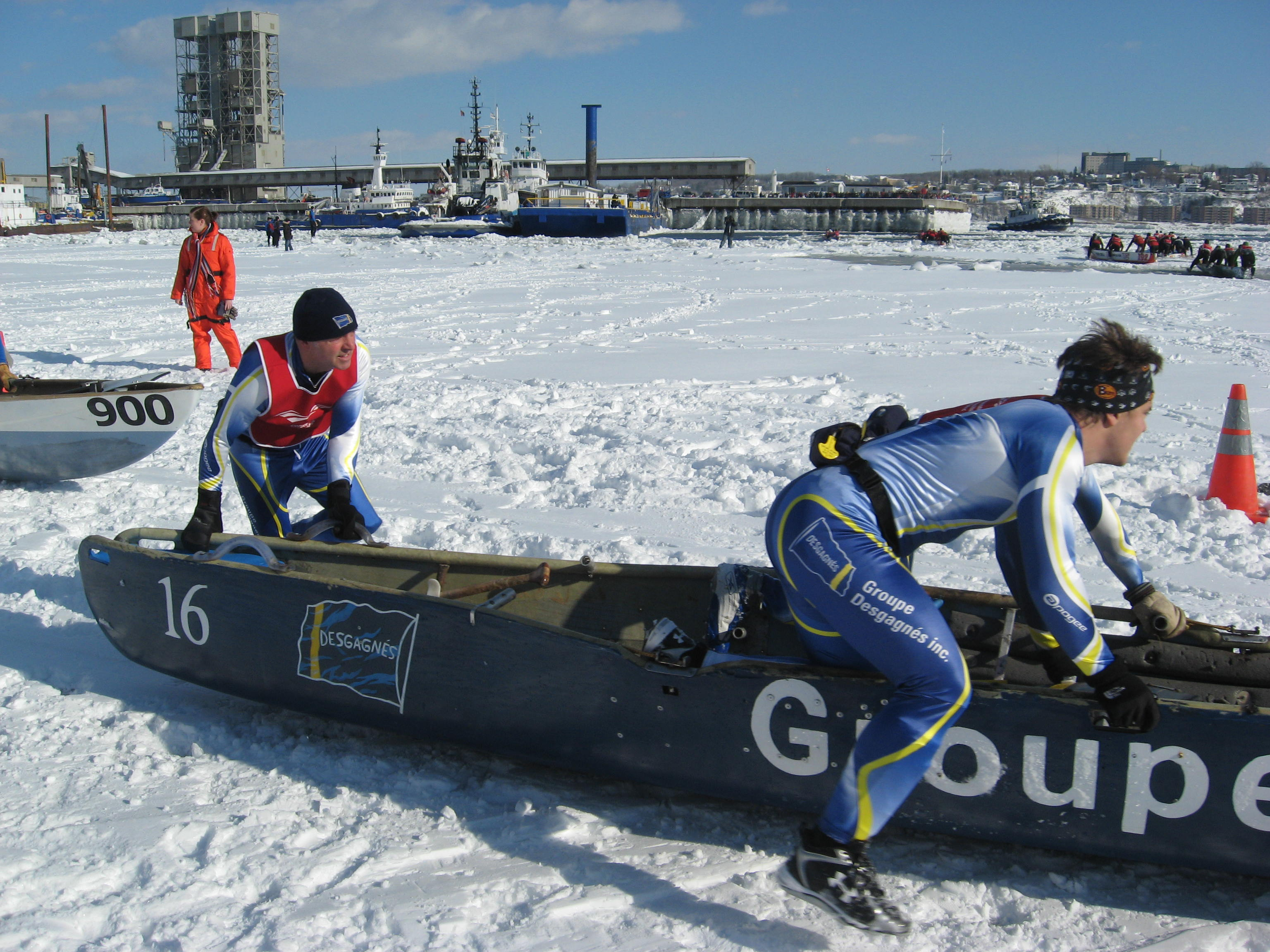 La course de Canot du Carnaval de Québec de 2011.